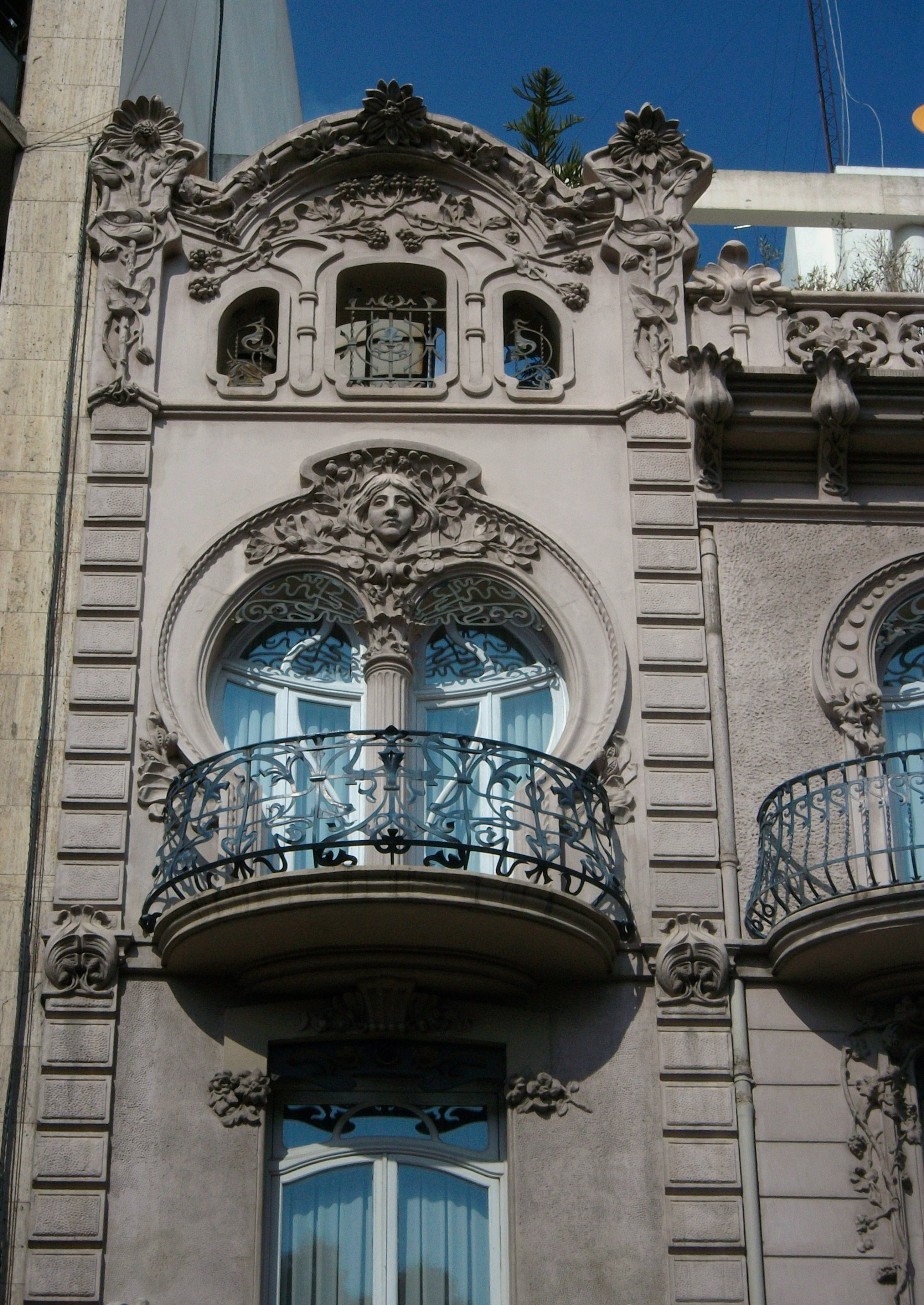 Balconet de la Casa Ortega, València.